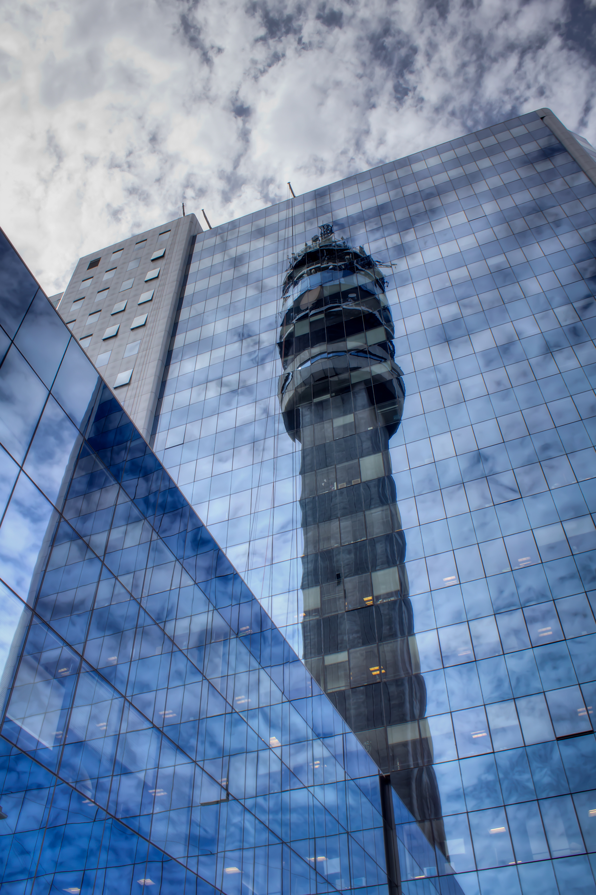 Torre Entel mirrored